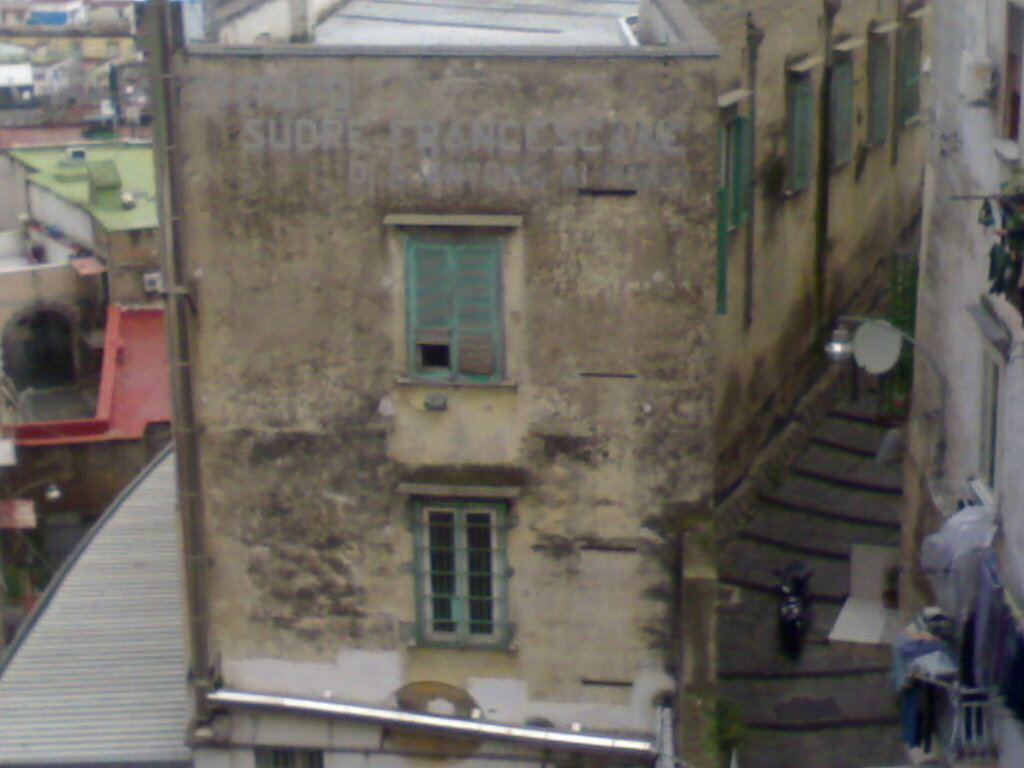 Complesso di Sant'Antonio ai Monti (Napoli)